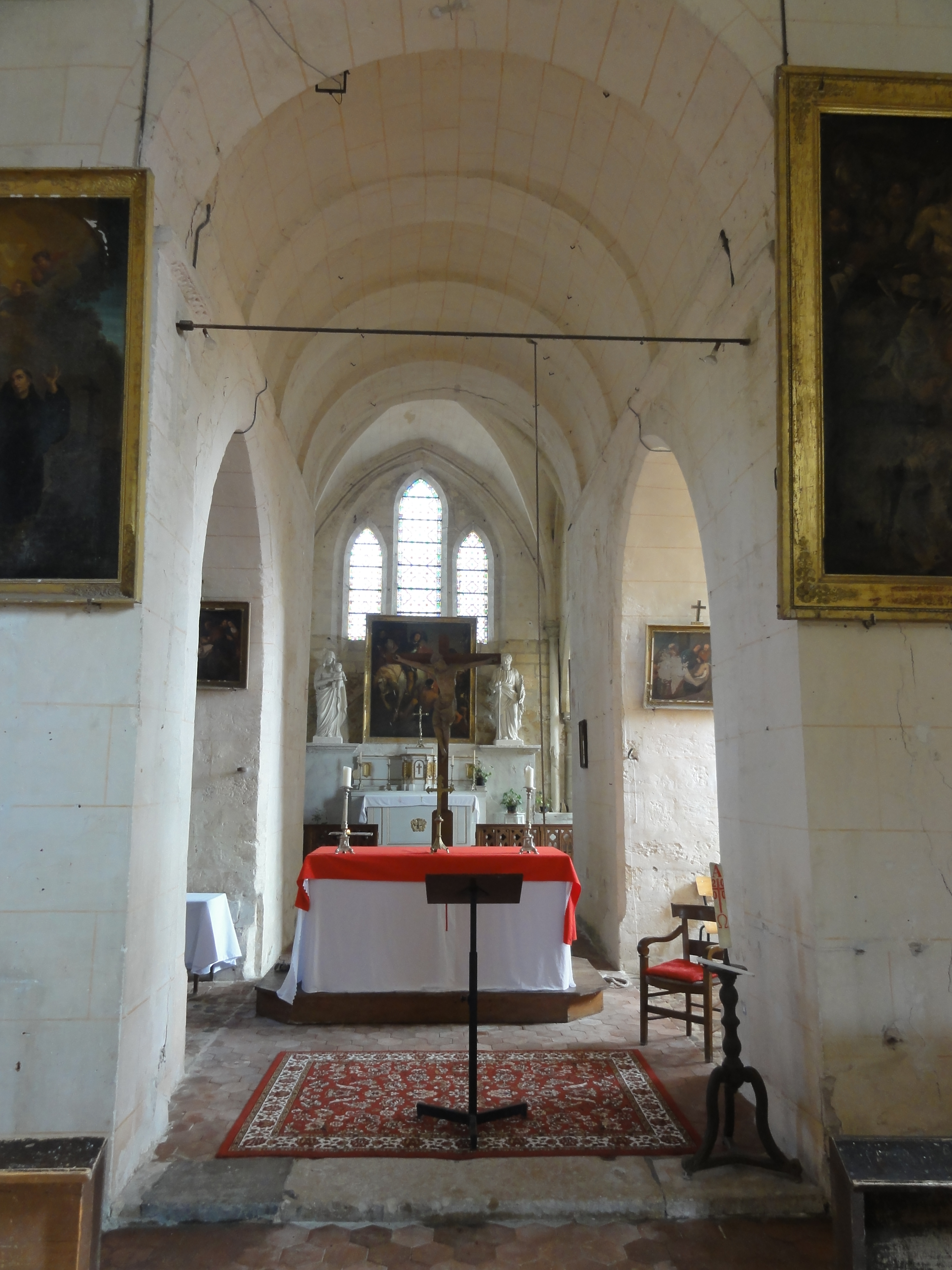 Intérieur de l'église - voir titre.